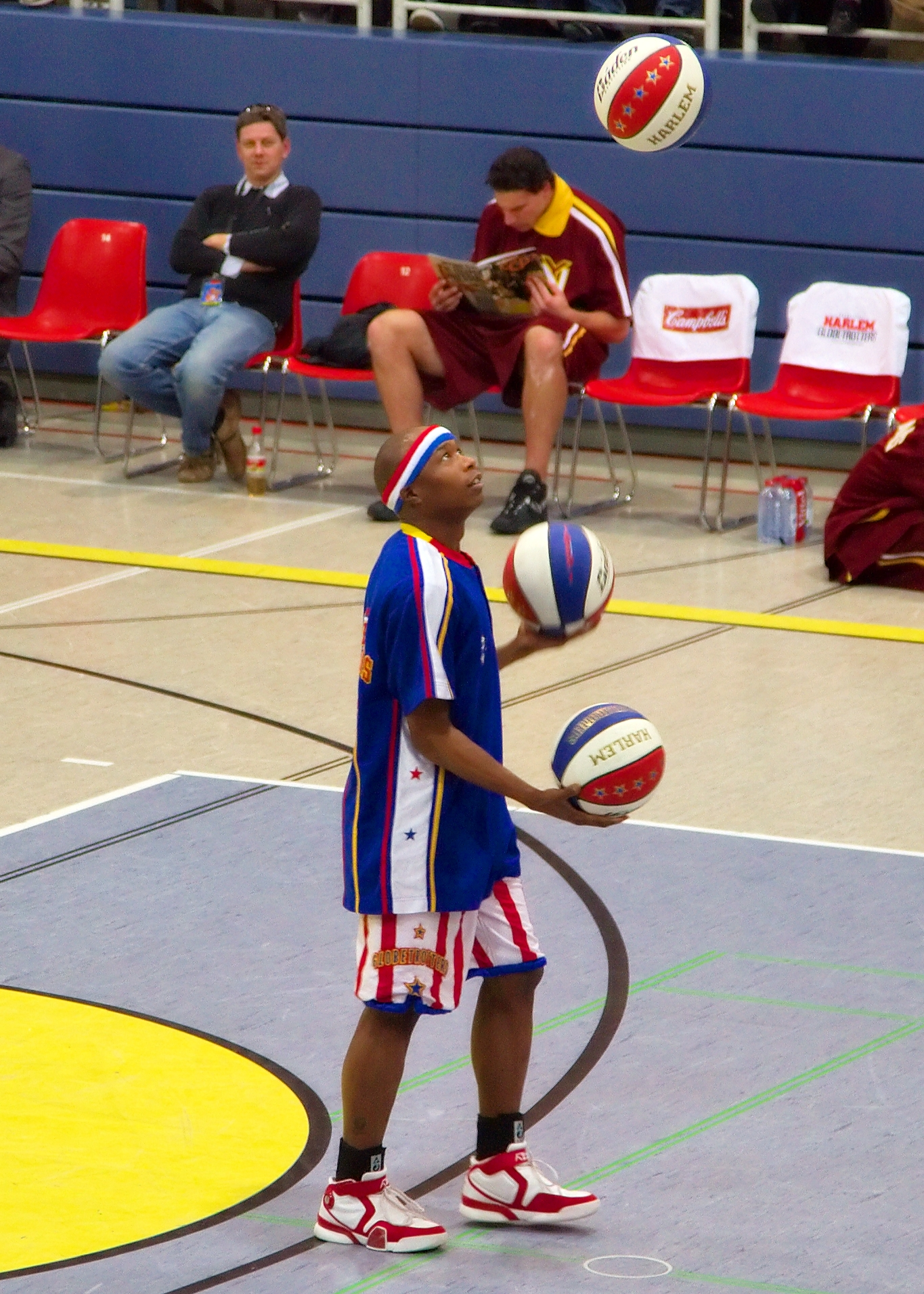 Harlem Globetrotters in Salzburg 29.03.2007